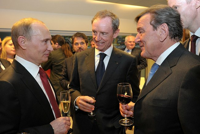 Владимир Путин о окончании матча сборной команды победителей Российской любительской хоккейной лиги с командой звёзд отечественного хоккея. С председателем Координационной комиссии МОК Жан-Клодом Килли (в центре) и Герхардом Шрёдером.